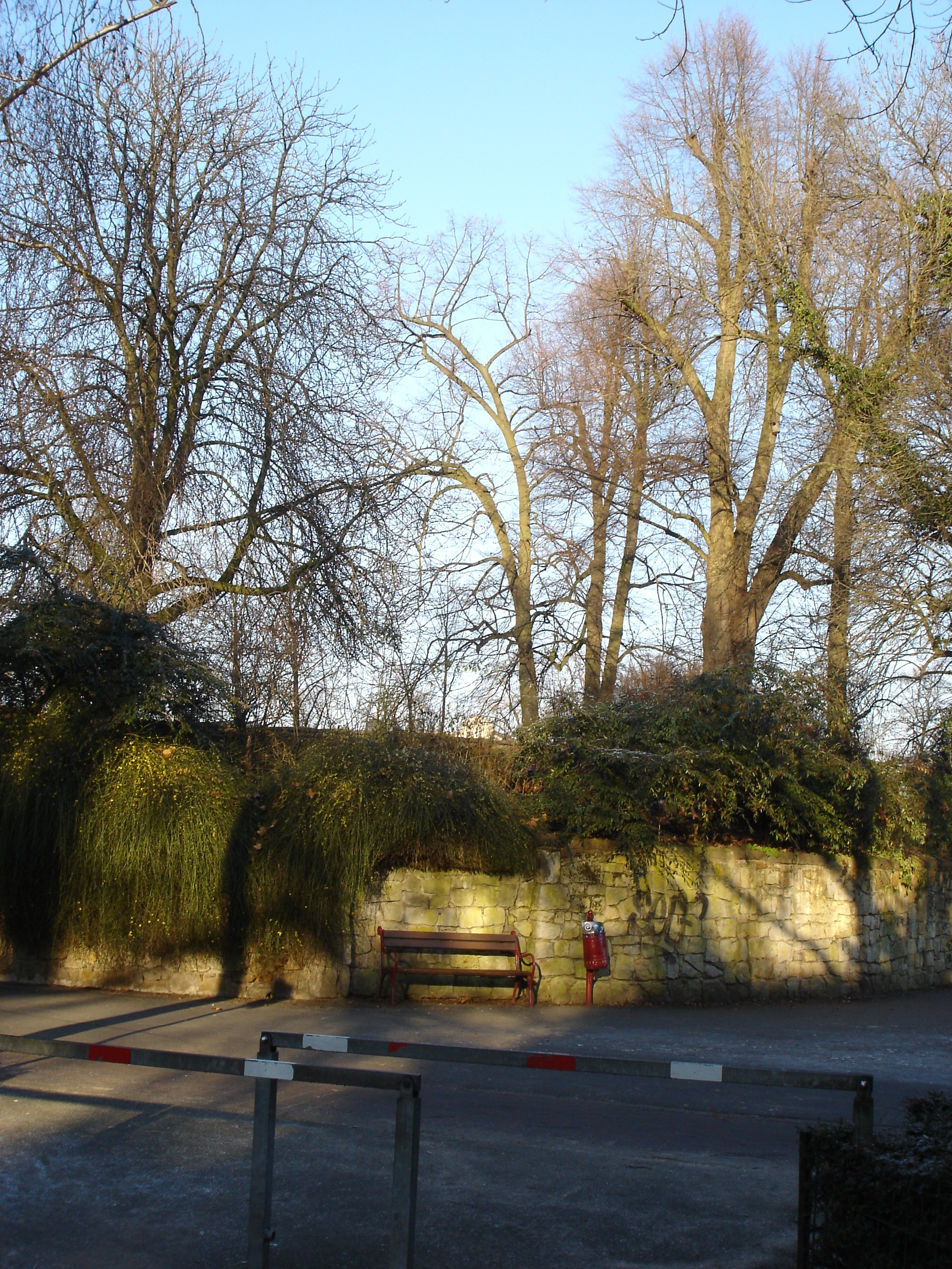 Die Außenmauer des Rondells der Aegidiischanze in Münster, Westfalen, Deutschland